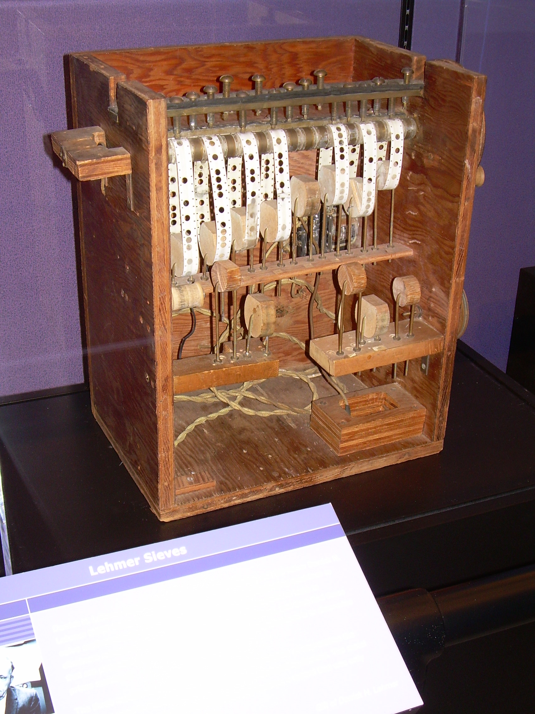 Computer Museum: Lehmer Sieves